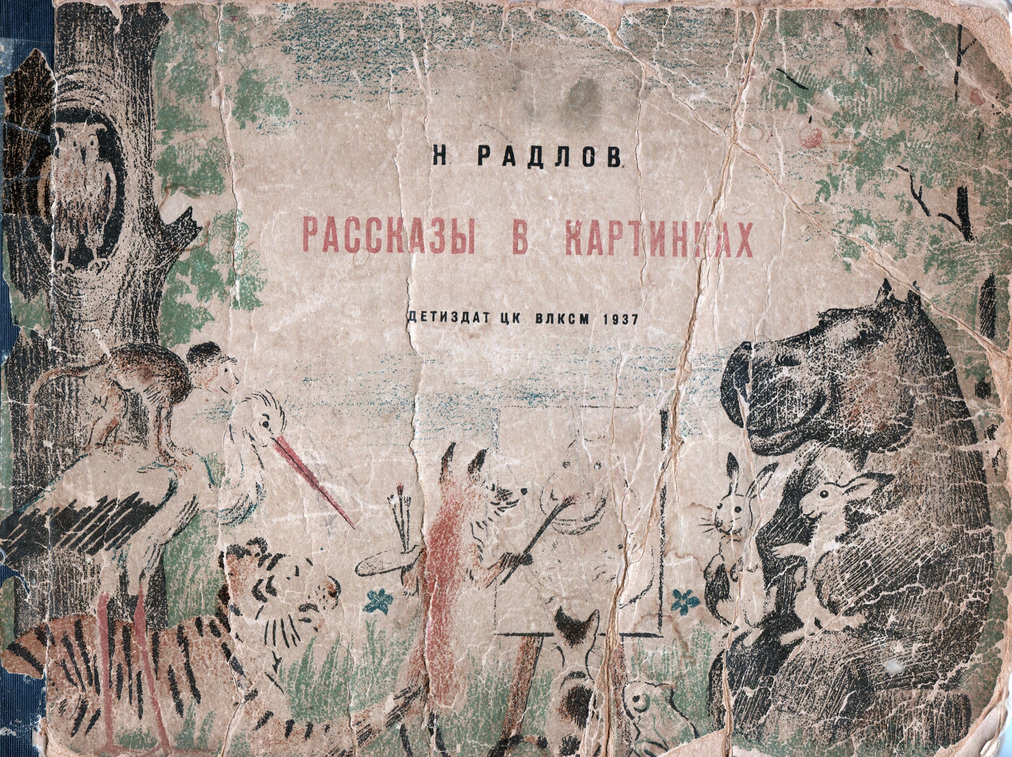 Обложка издания: Радлов Н. Э. Рассказы в картинках. Л.: Детиздат ЦК ВЛКСМ, 1937.